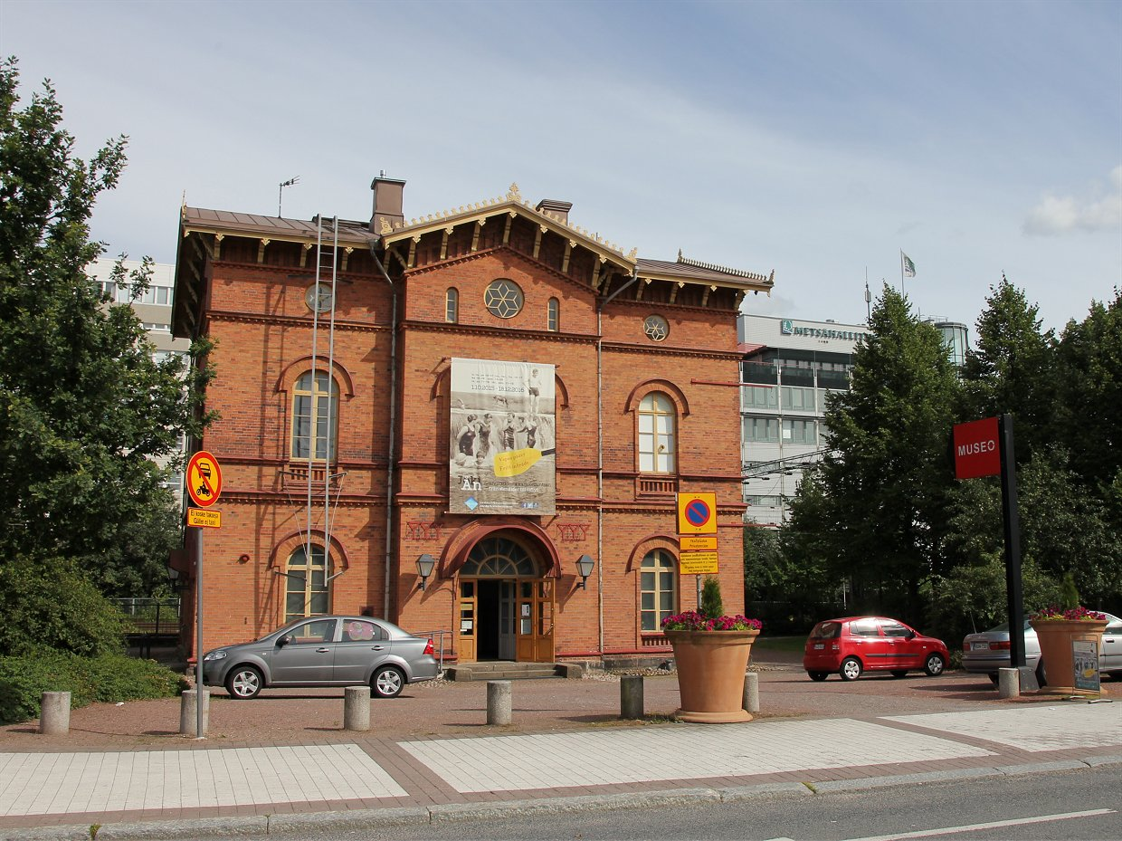 Vantaan kaupunginmuseo, Tikkurila Vantaa. Museon osoite on Hertaksentie 1, 01300 Vantaa